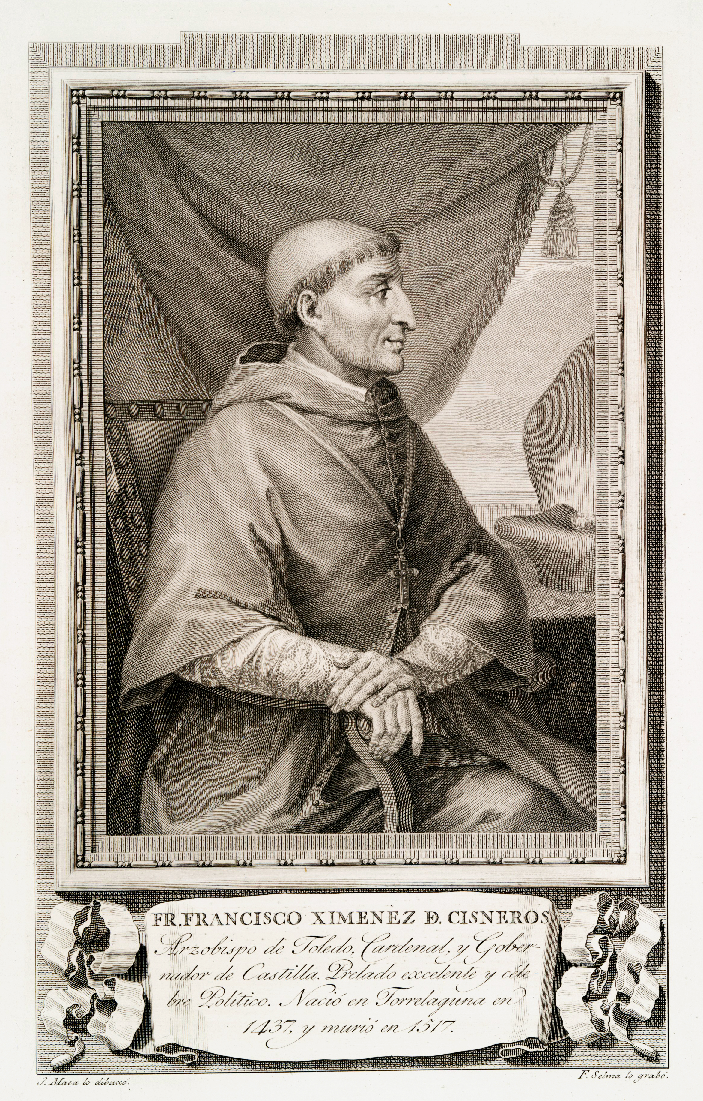 Retrato del Cardenal Francisco Jiménez de Cisneros.